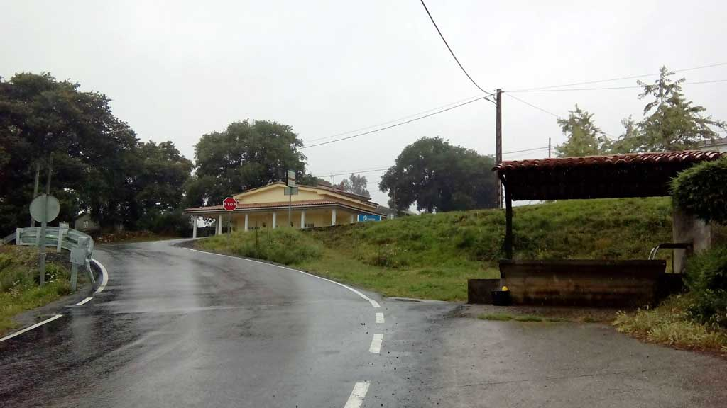 Vista da Illana, Curtis.